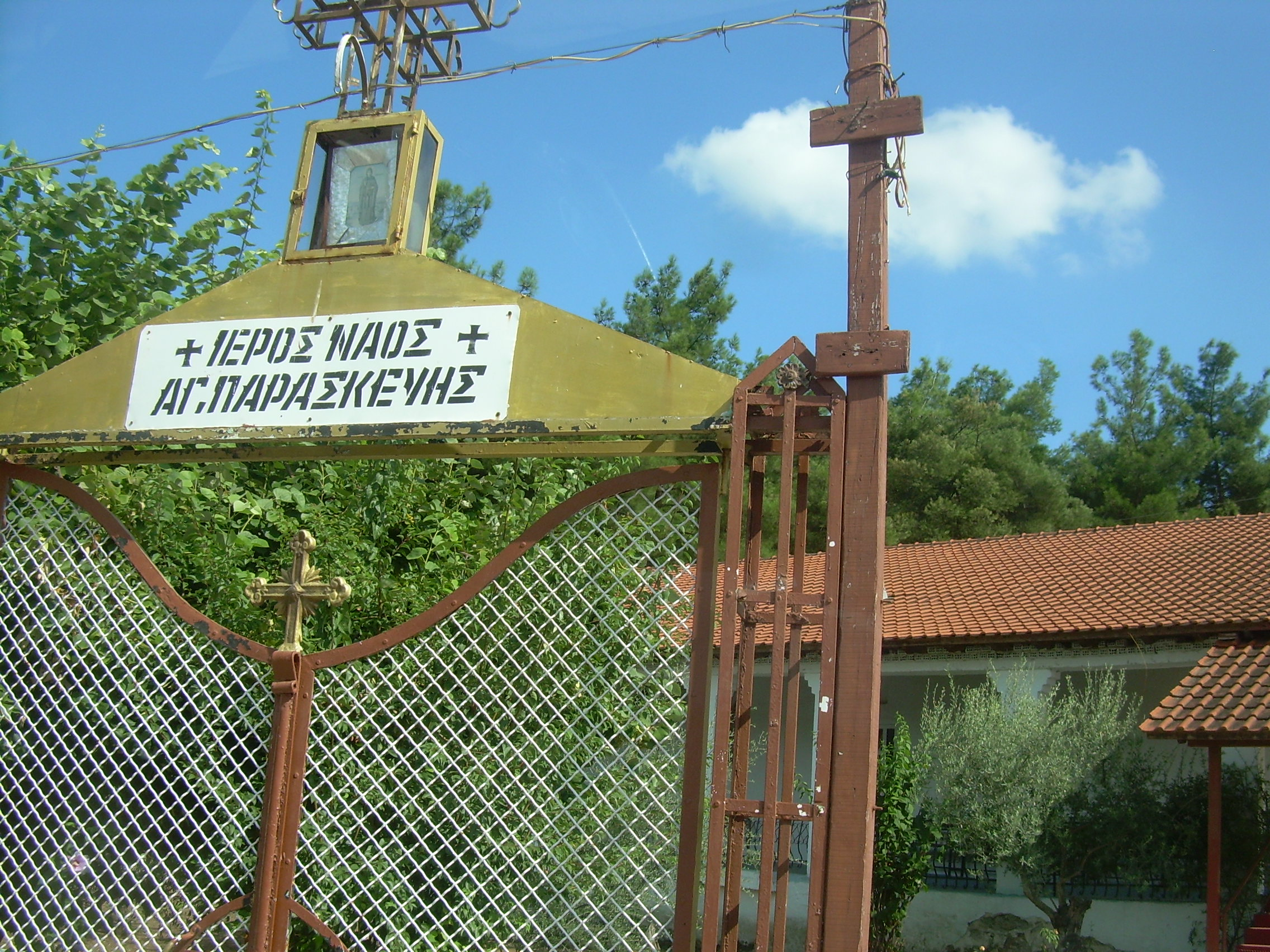 Πατρίδα Πιερίας, η εξώπορτα του Ναού της Αγίας Παρασκευής